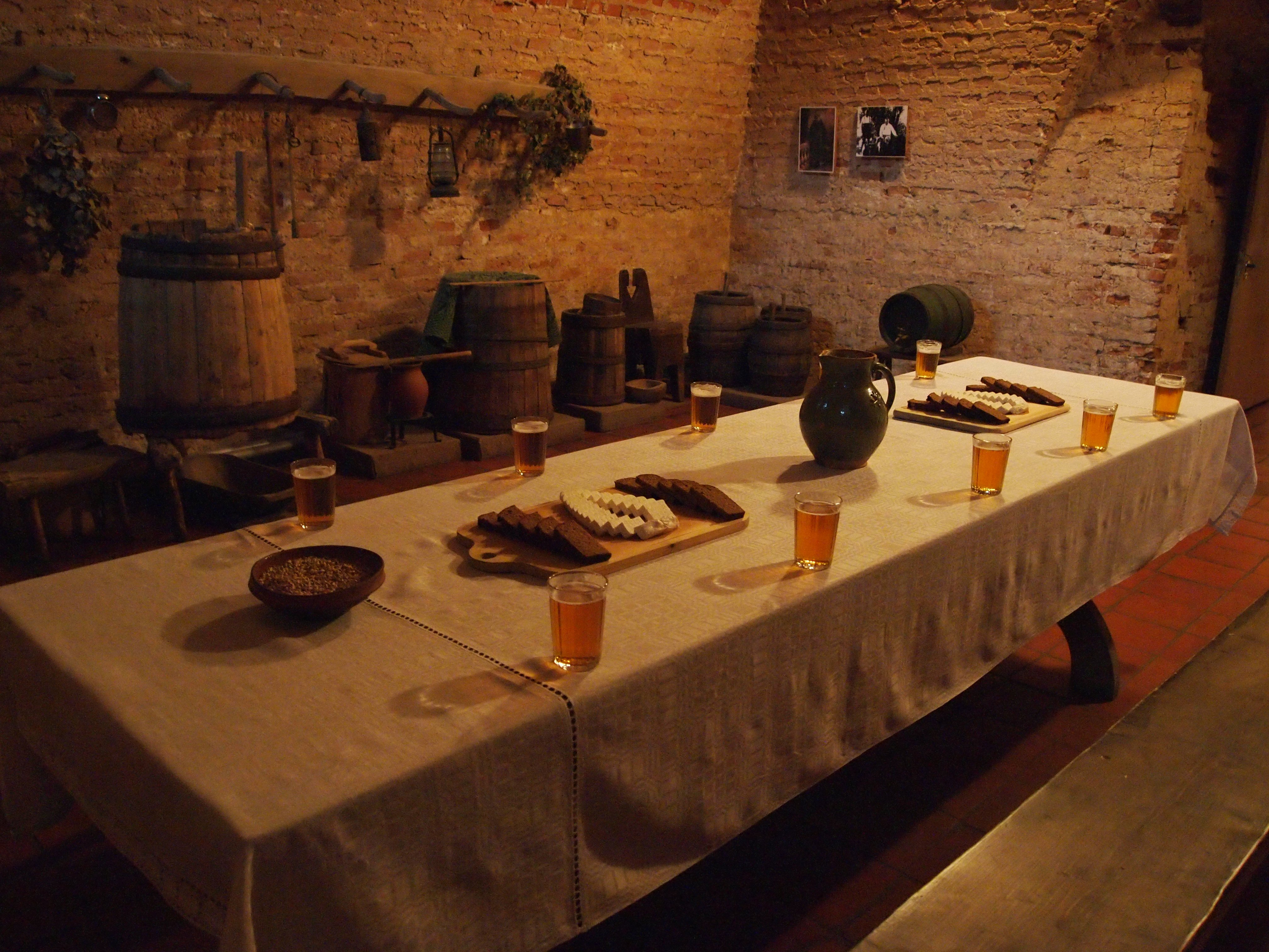 Edukacinė programa suaugusiems „Žaldoko alus“